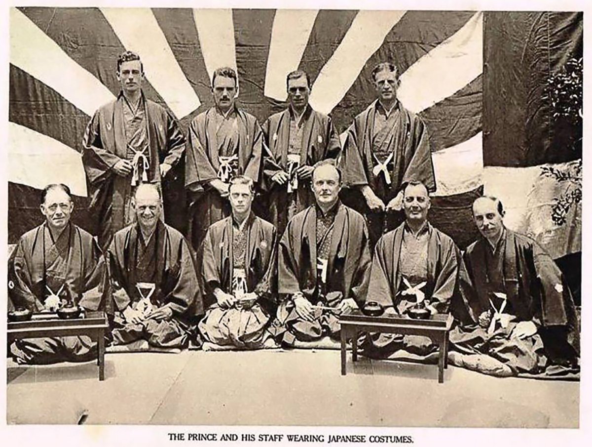 エドワード8世が皇太子時代に来日した際に随行員とともに和装で撮影。1922年。